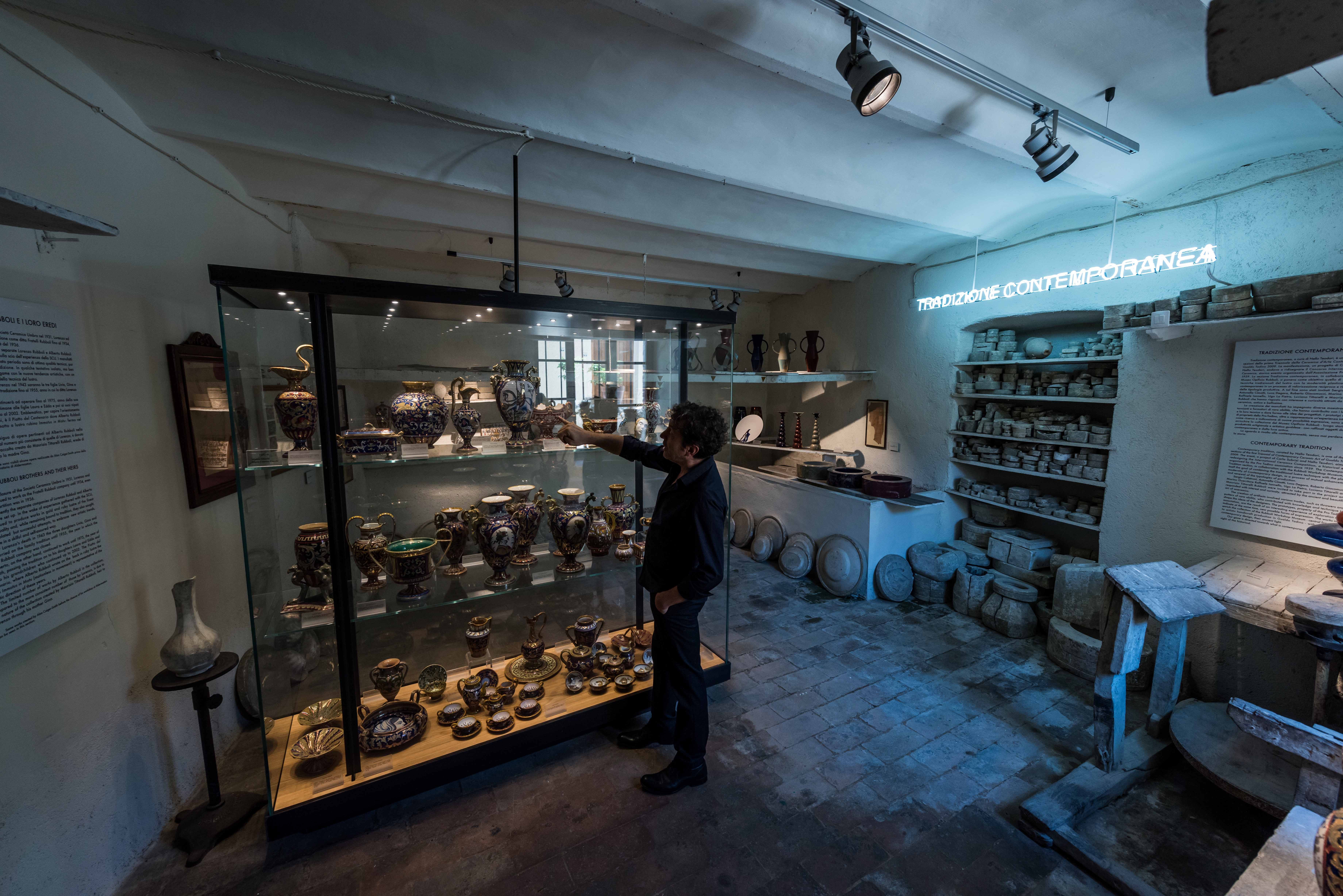 Sala della Smaltatura del Museo Opificio Rubboli, opere che vanno dal 1930 al 1950